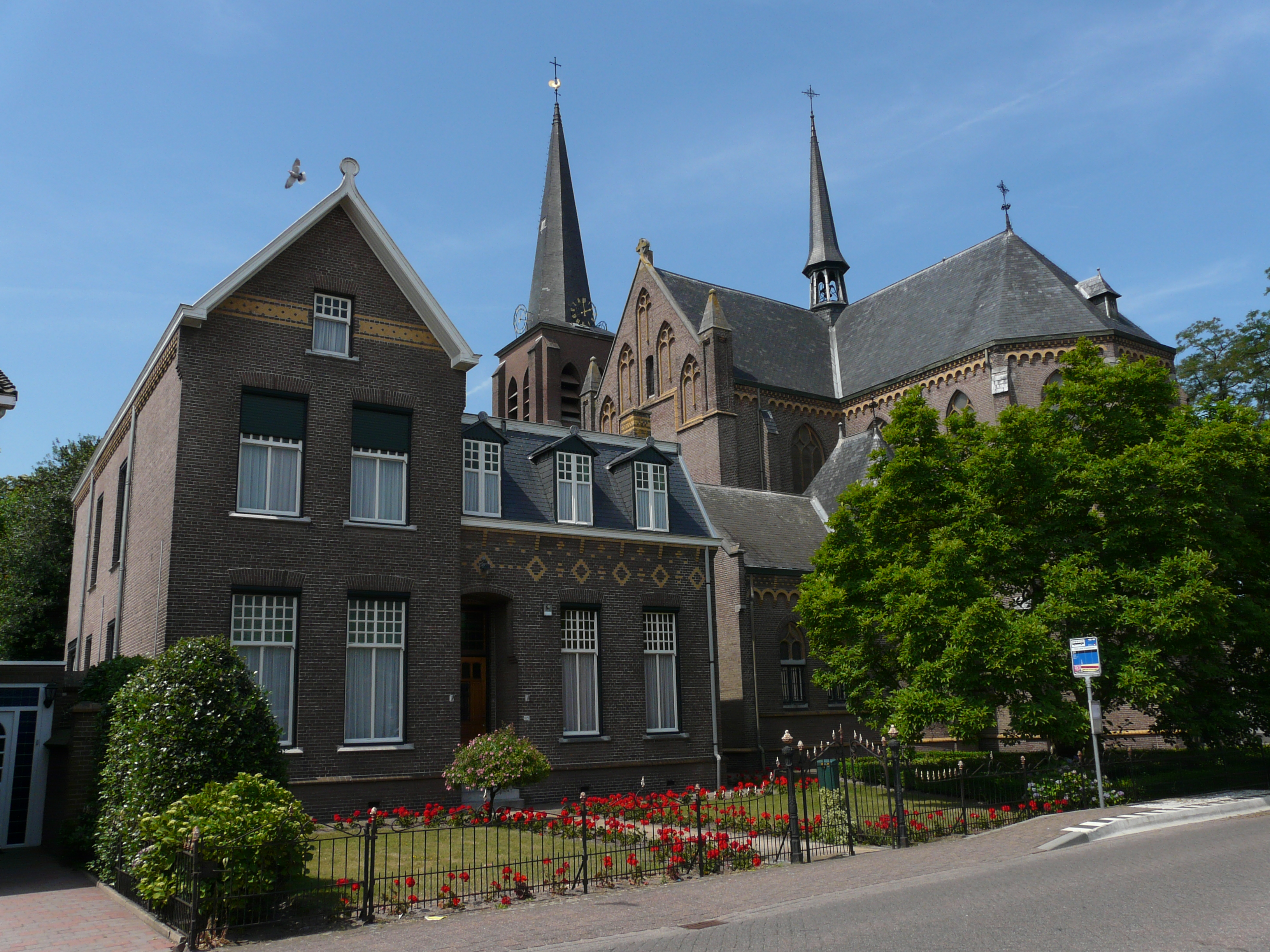 Zicht op de Pastorie en de Heilige Maria Boodschapkerk (Zegge) in Zegge